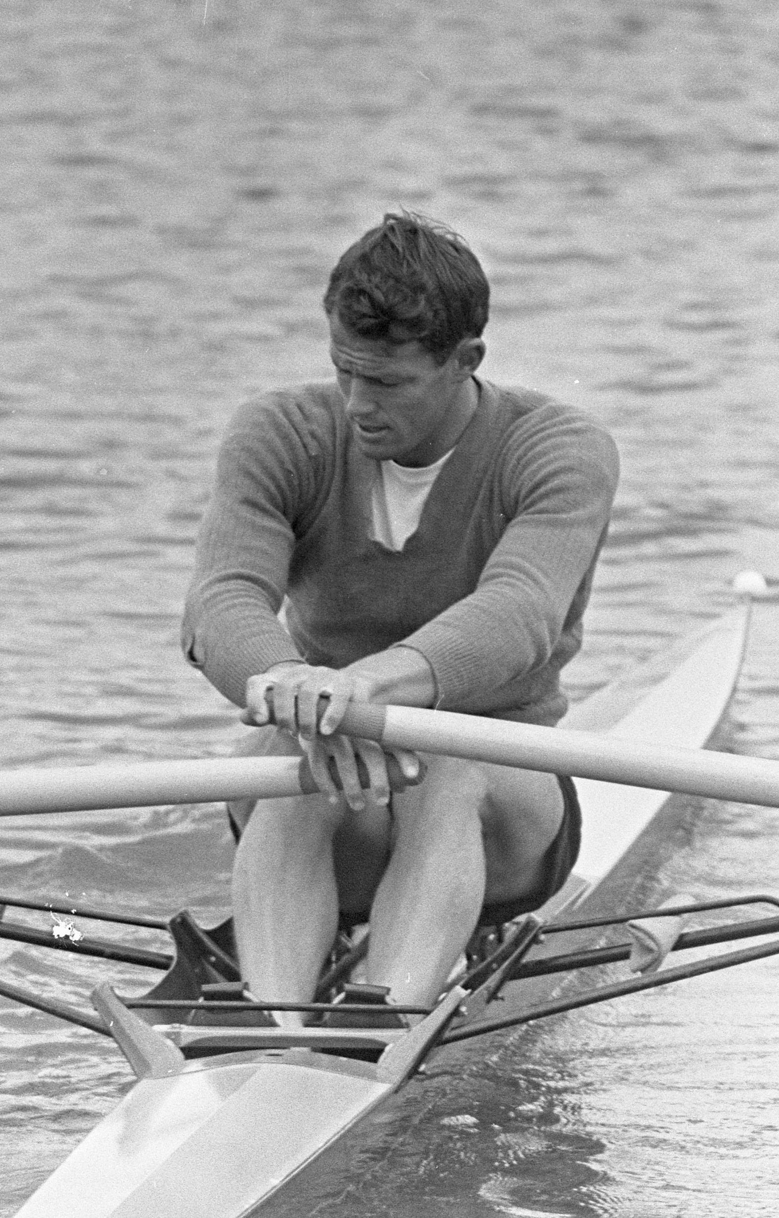 Training Europese roeikampioenschappen, skiffeur Watkinso uit Nieuw Zeeland